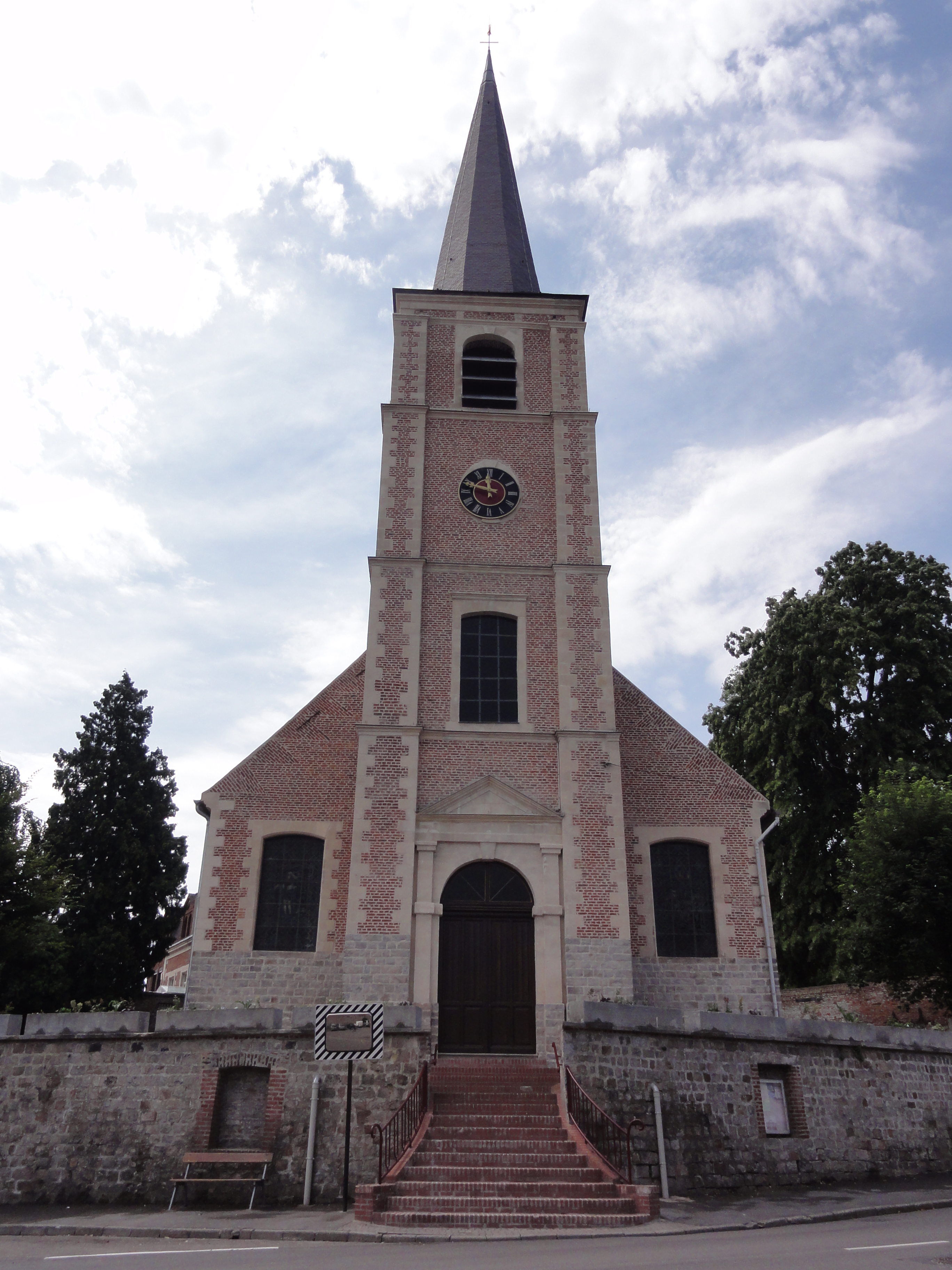 Artres (Nord,Fr) église